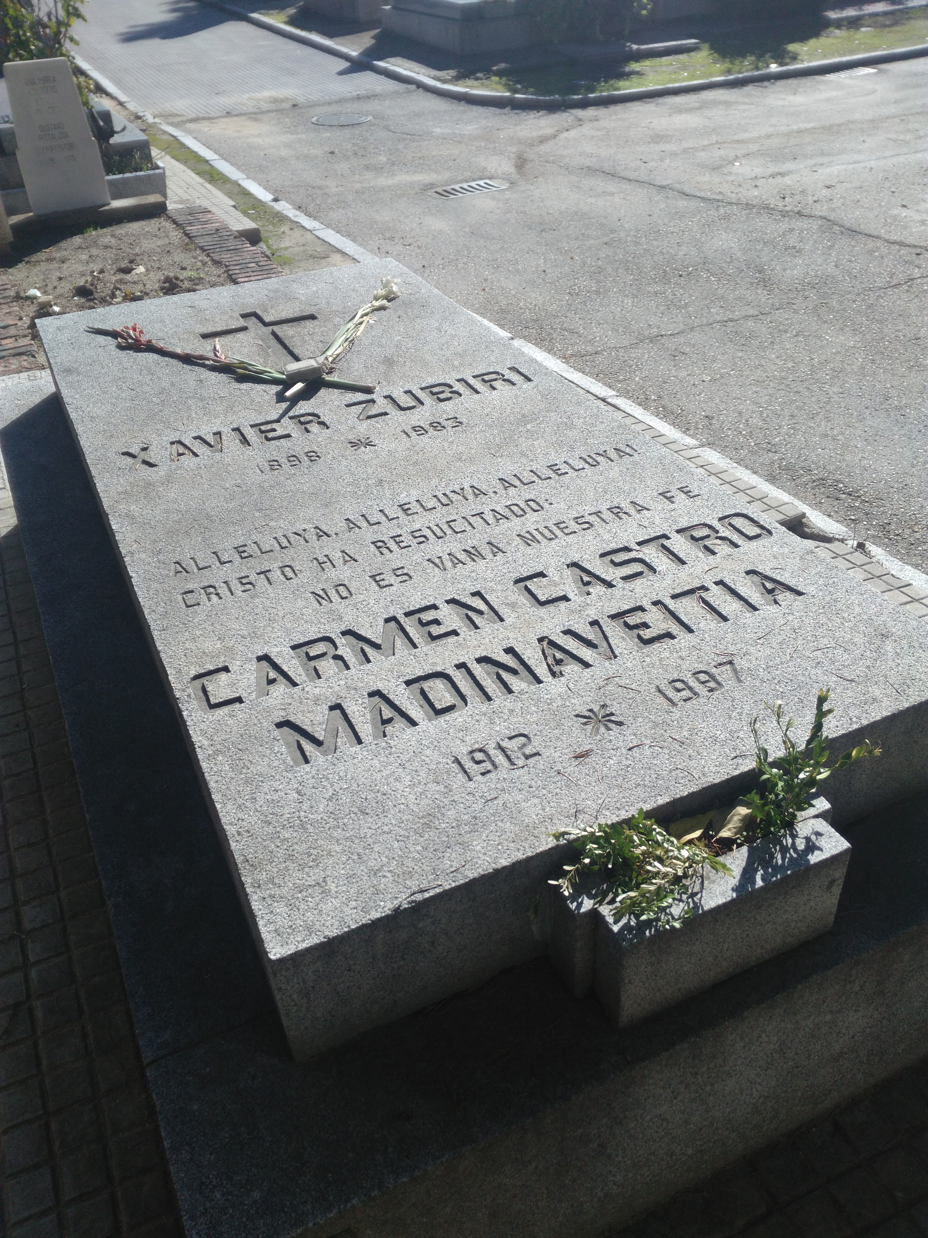 Tumba de Xavier Zubiri y Carmen Castro Madinaveitia, en el cementerio civil de Madrid.